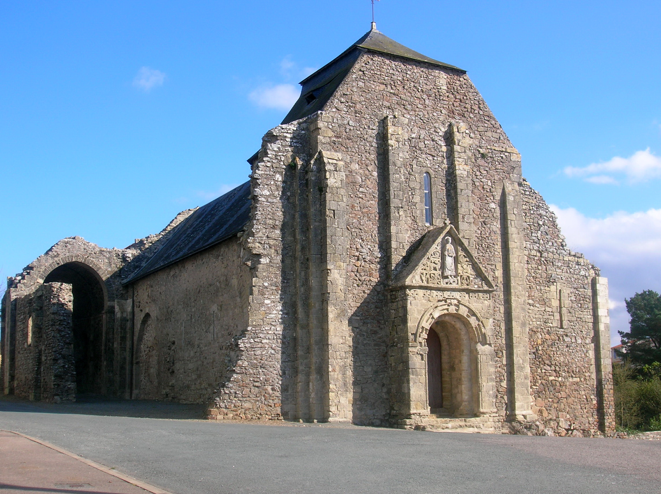 Eglise Saint Nicolas-de-Brem